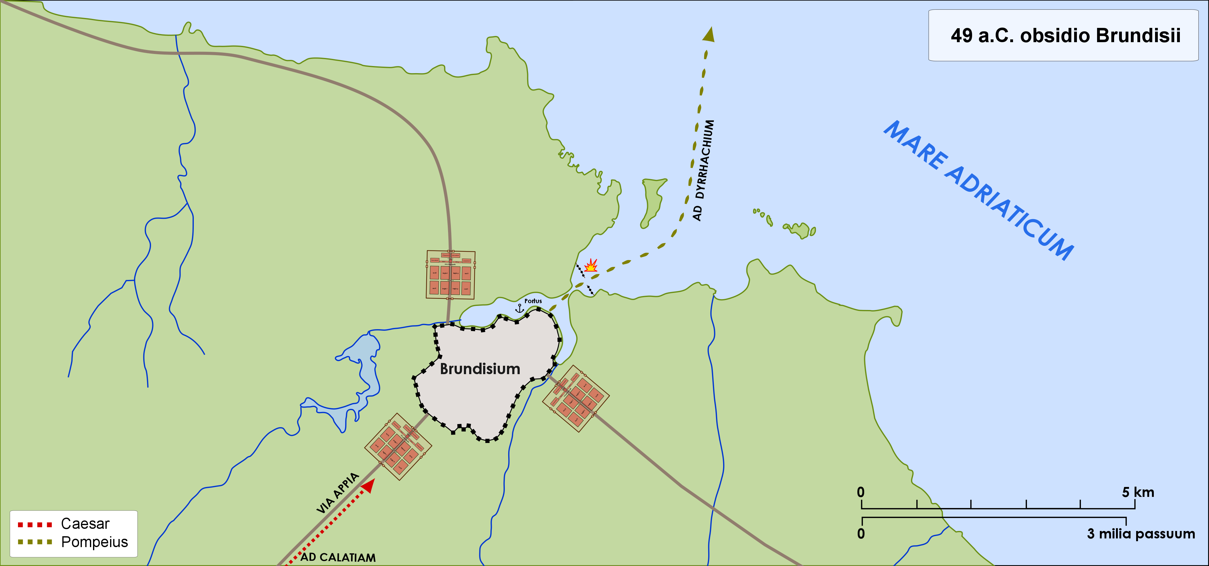 Cesare assediò Pompeo a Brundisium (9-17 marzo del 49 a.C.)